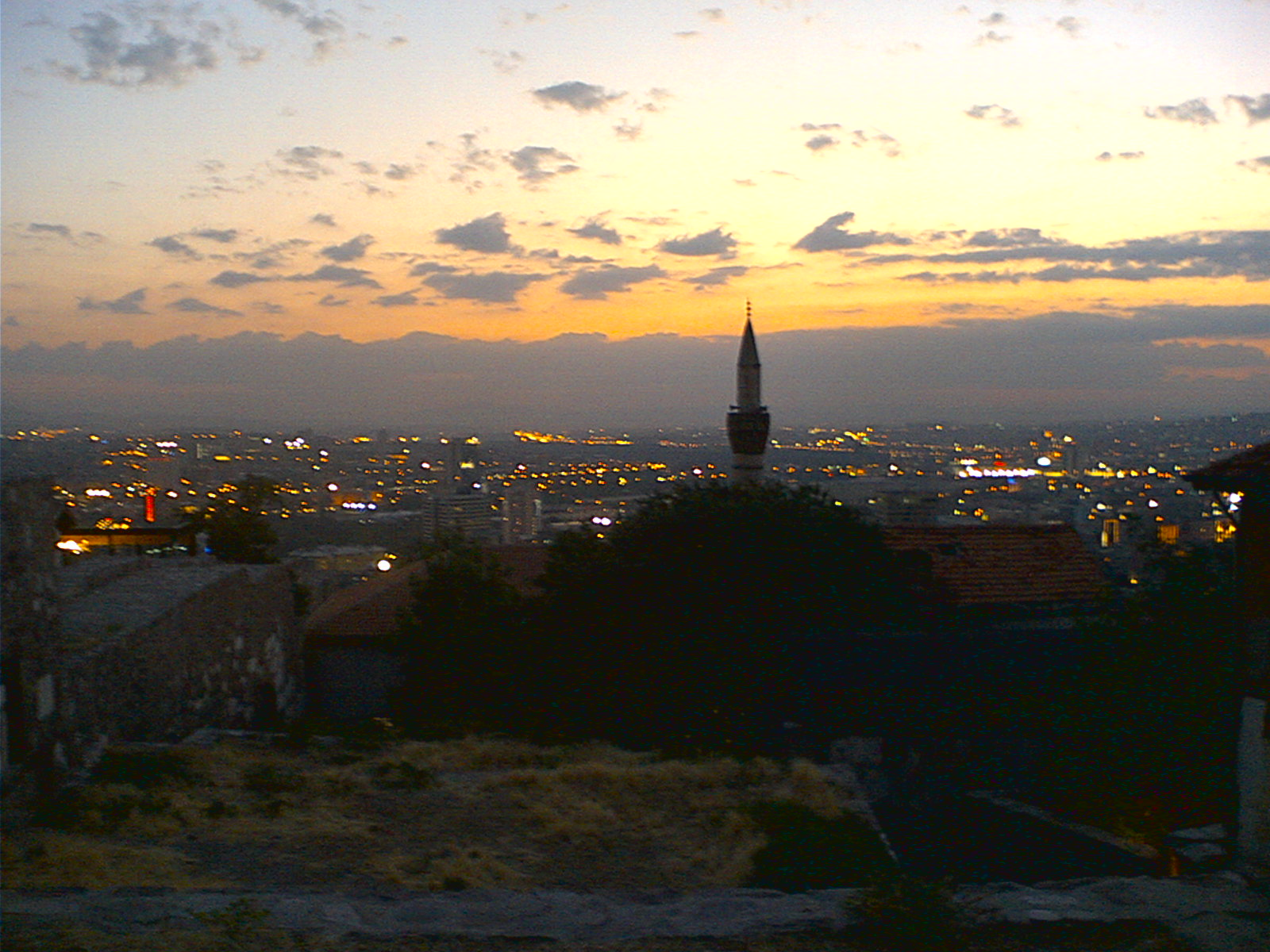 La città di Ankara all'imbrunire vista dal castello. Immagine realizzata da pnc_net.